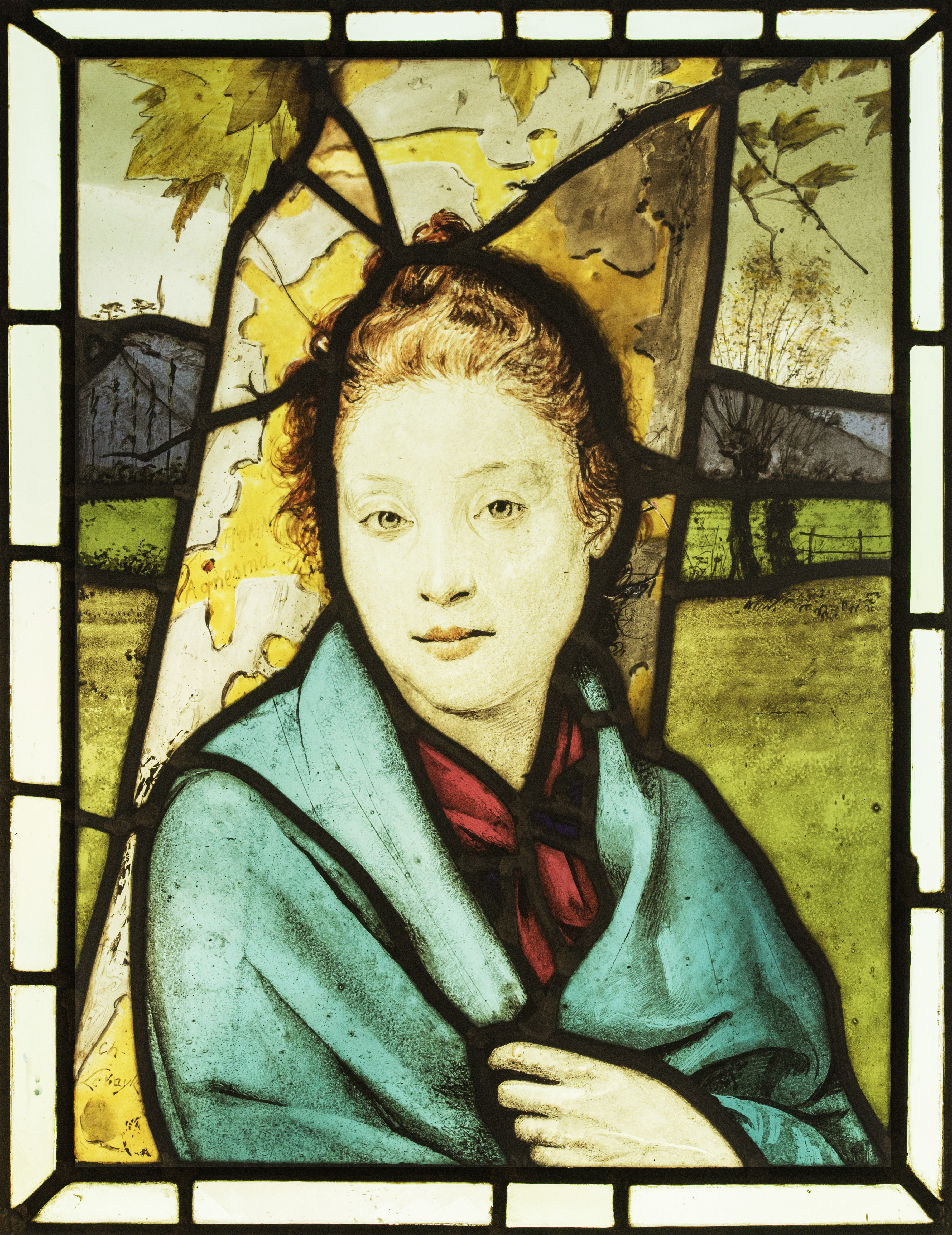 Vitrail de Charles Lebayle dit "Agnesina". Elle fût Martyr au début du IVe siècle pour avoir refusé de se donner au fils du préfet de Rome. 62 X 46 cm.